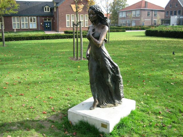 Statue of Sylvia Millecam in Boxmeer, The Netherlands. Sculptor:Margriet Hovens, 2007